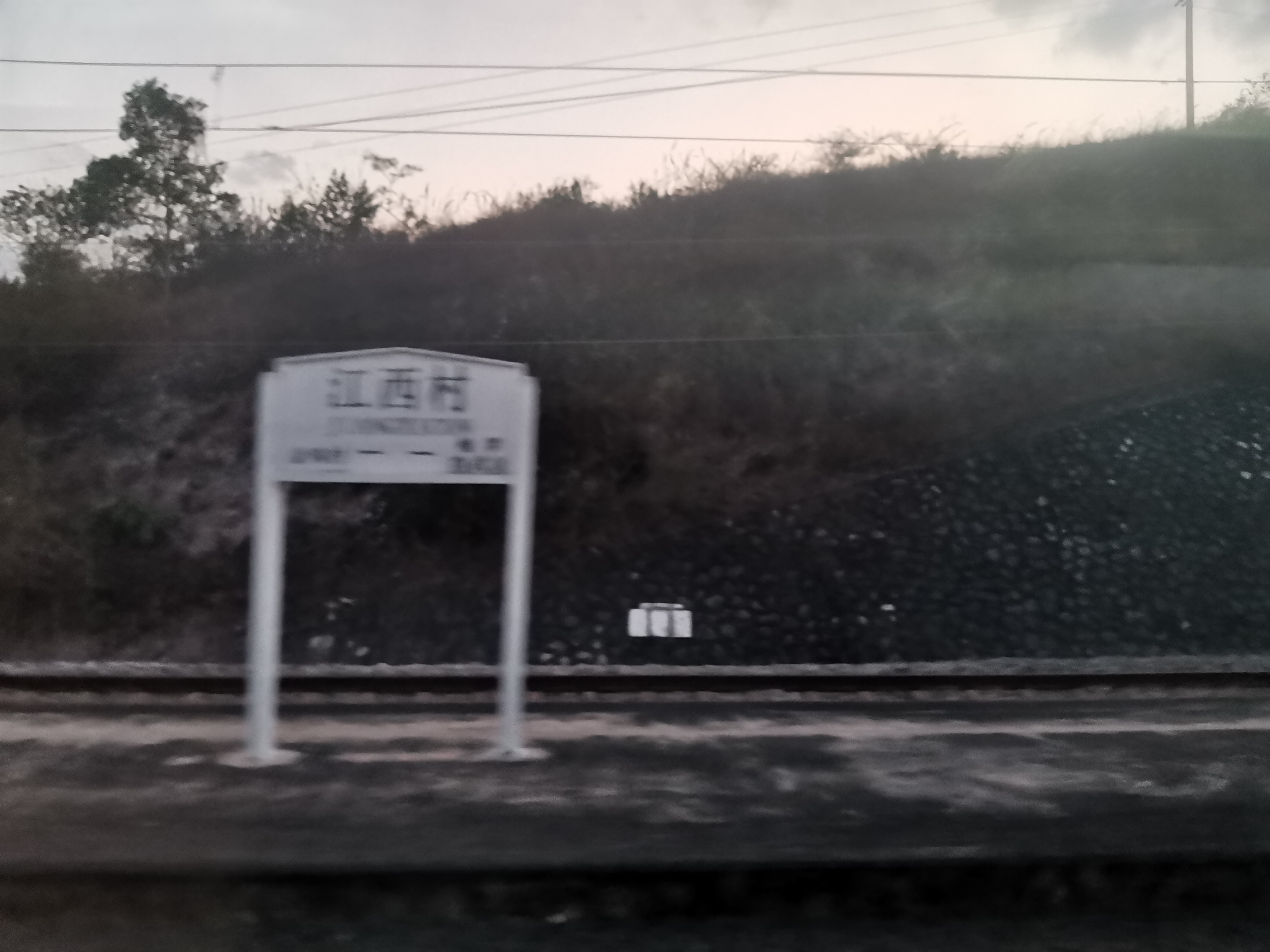 南宁江西村火车站第一代站房